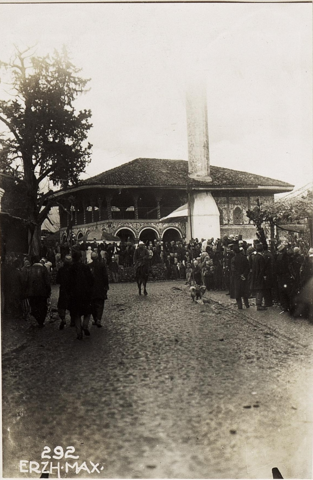 Strasse in Tirana.